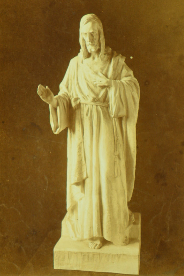 Model van August Falise (1875-1936) voor het Heilig Hartbeeld in Oss